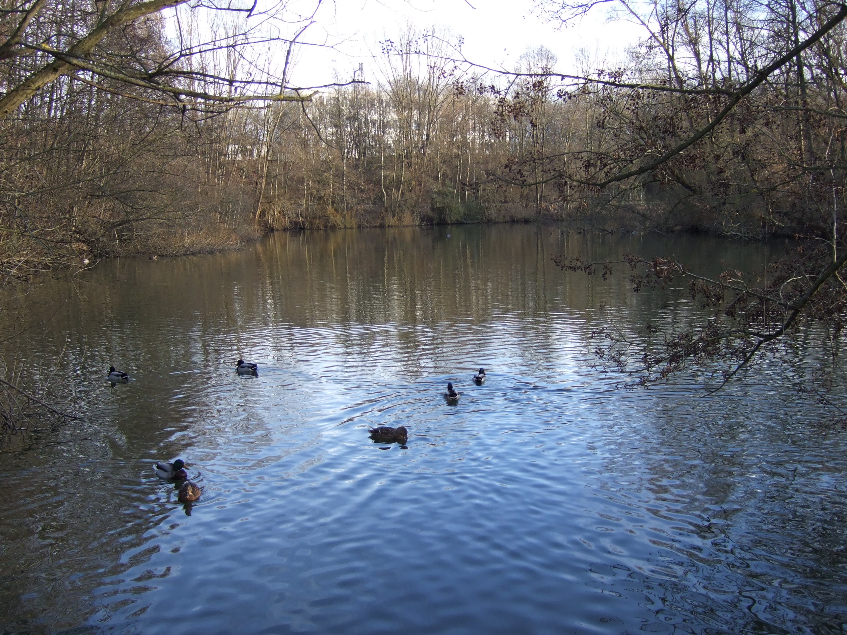 Glasenweiher Bayreuth